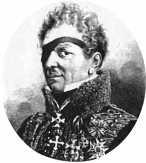 Graf Adam Albert von Neipperg (1775-1829), Österreichischer General, zweiter Ehemann der Kaisertochter und Witwe Napoleons Maria-Luise von Österreich